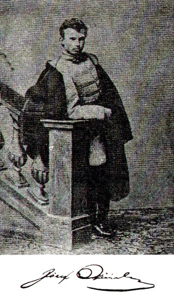 Józef Oxiński (1840–1908)